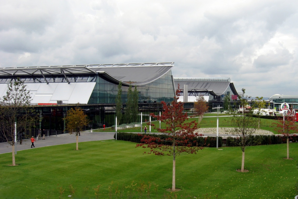 Neue Messe Stuttgart, Messepark